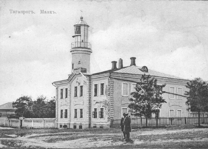 Таганрог, маяк